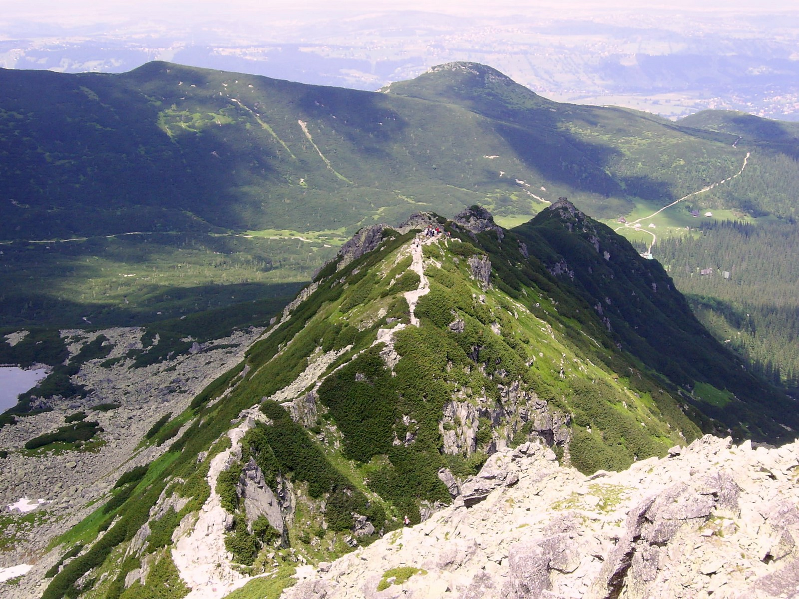 Mały Kościelec z Kościelca